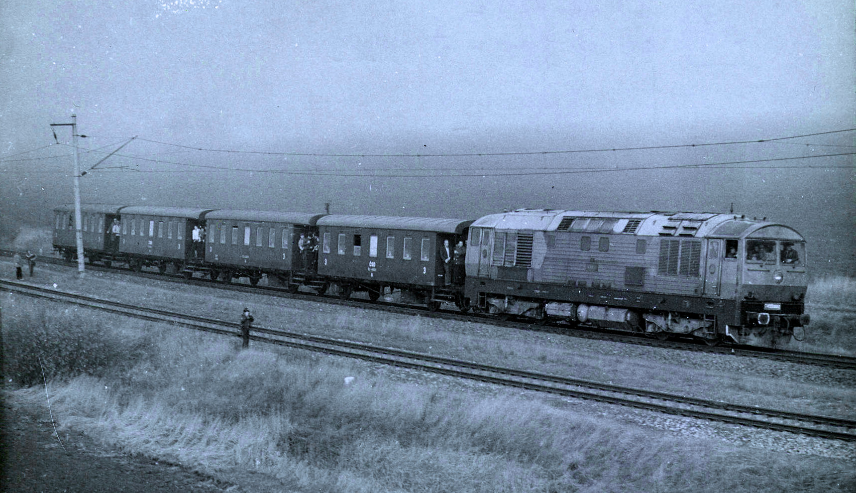 Lokomotiva T 499.0002 na oslavách 20. výročí Železničního zkušebního okruhu